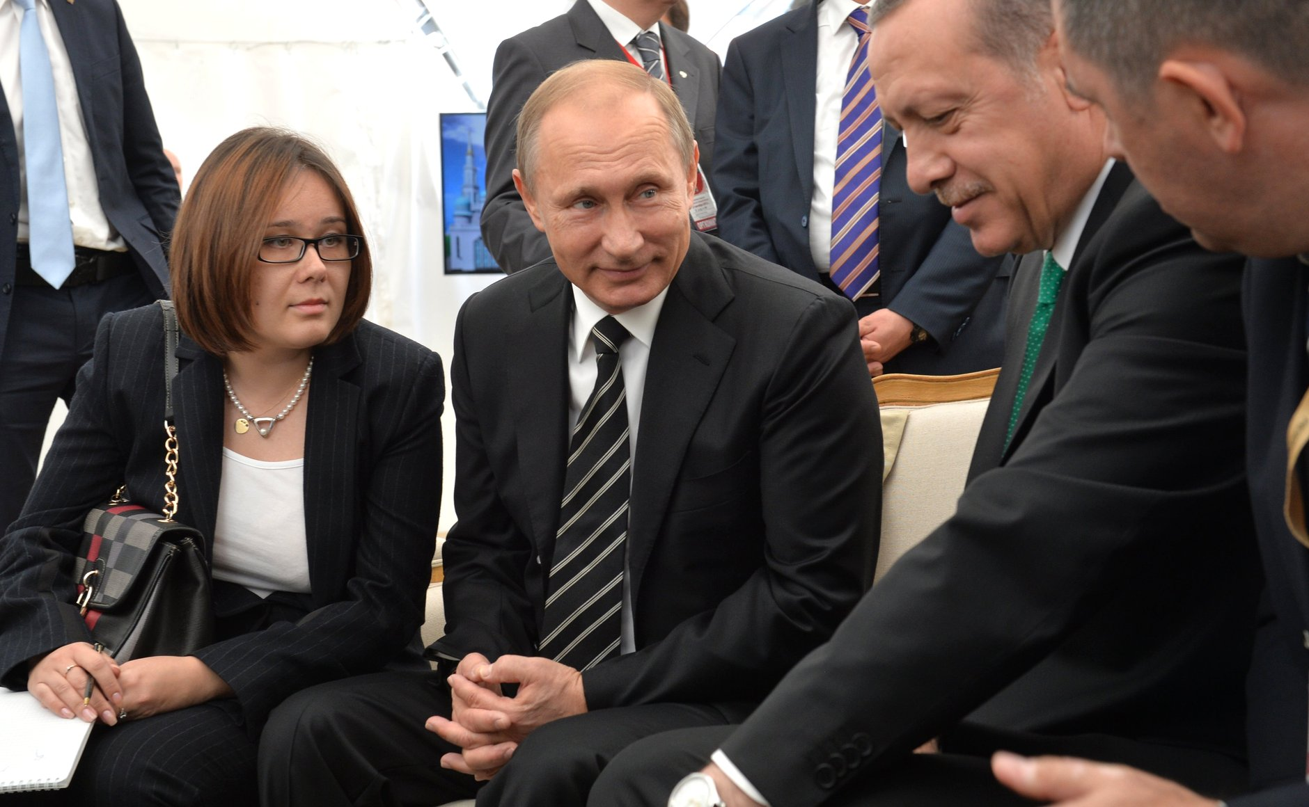 Открытие нового комплекса Московской соборной мечети.